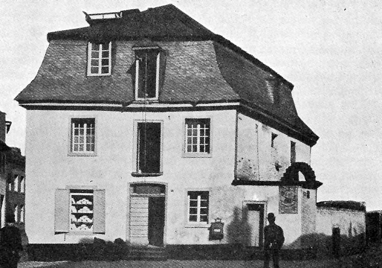 Die ehemalige Dominkus-Mühle in Köln Mülheim an der Bachstraße, um 1900